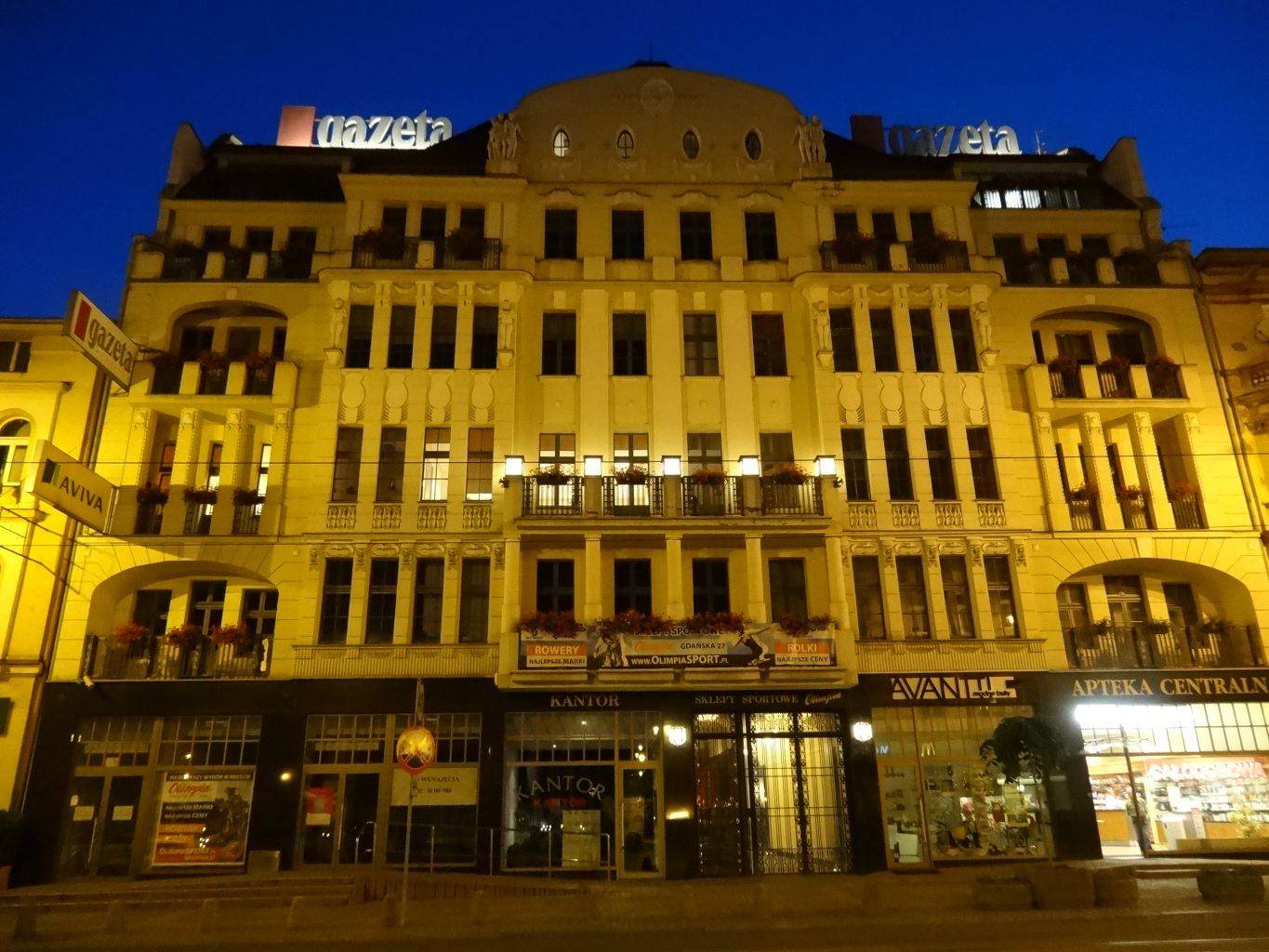 Kamienica przy ul. Gdańskiej w Bydgoszczy